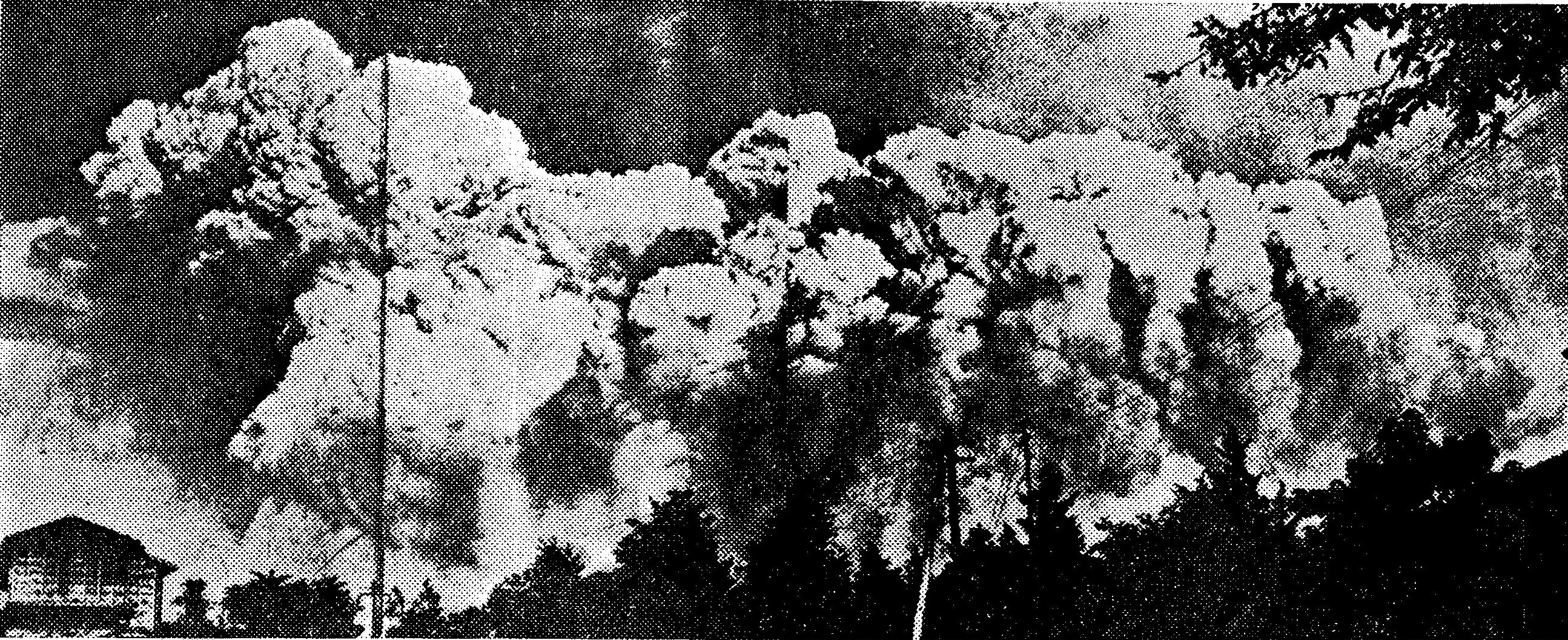 関東大震災の時に東京上空で発生した積乱雲。大正12年9月1日